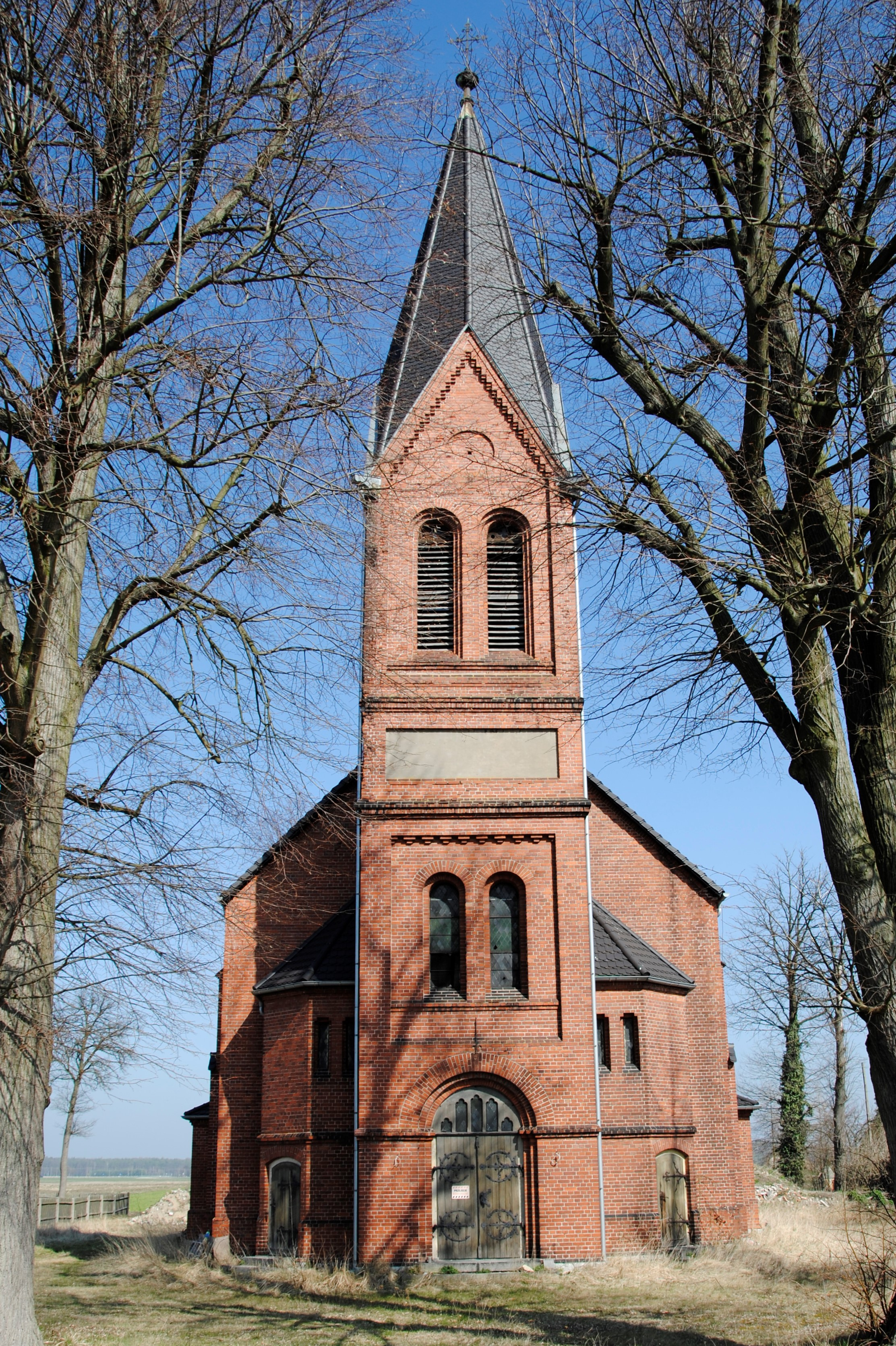 Antonius-von-Padua-Kirche in Heinrichsfelde/Oberschlesien (poln. Grabie)